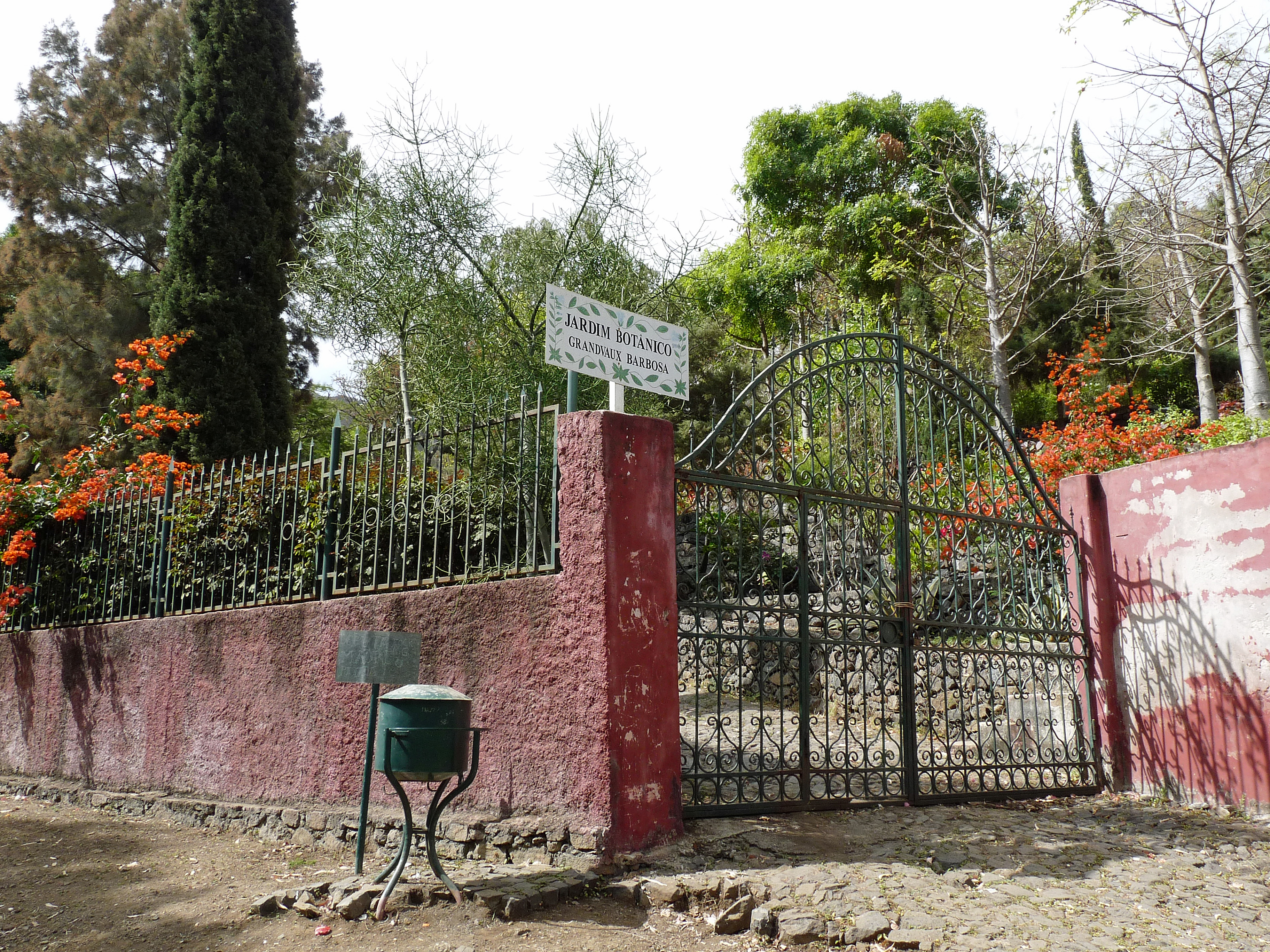 São Jorge dos Órgãos (Santiago, Cap-Vert) : entrée du Jardin botanique national Grandvaux Barbosa